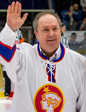 1. liga - 13.12.2014 16:00 CET - Round 34 Rytíři Kladno 4:0 (2:0, 1:0, 1:0) HC Dukla Jihlava